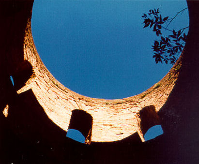 Turm der Burgruine "Schwalbennest" bei Neckarsteinach im Kreis Bergstraße